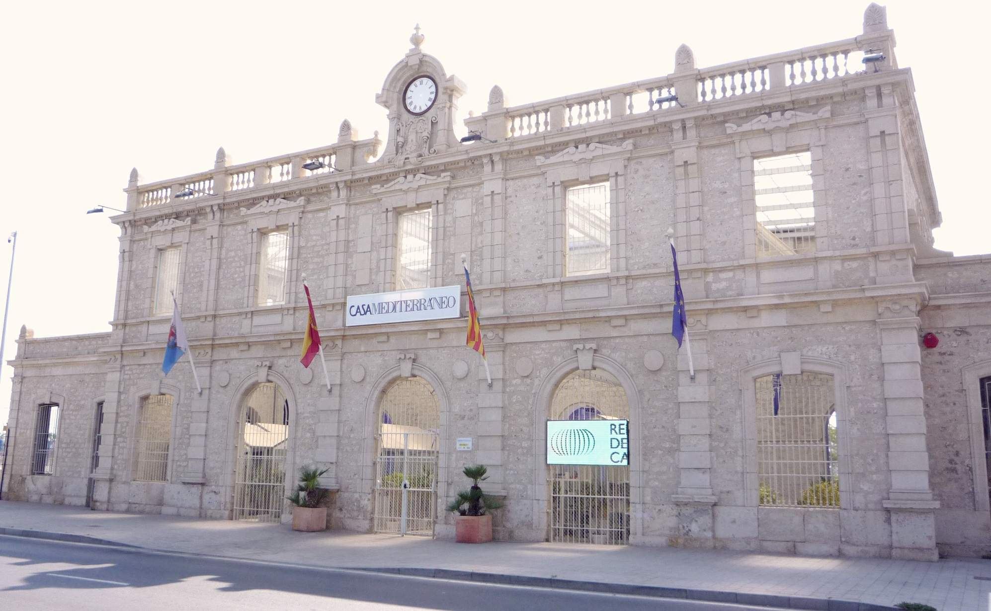 Alicante - Casa Mediterráneo (antigua Estación de Benalúa)